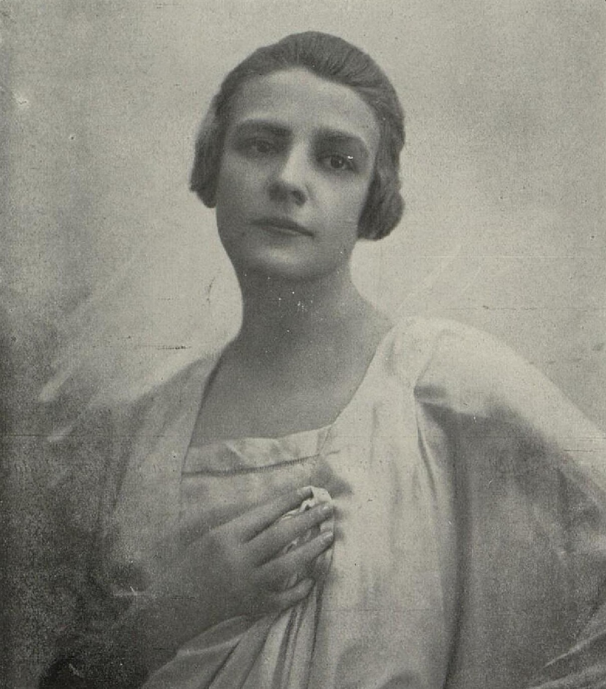 Lída Sudová, česká herečka